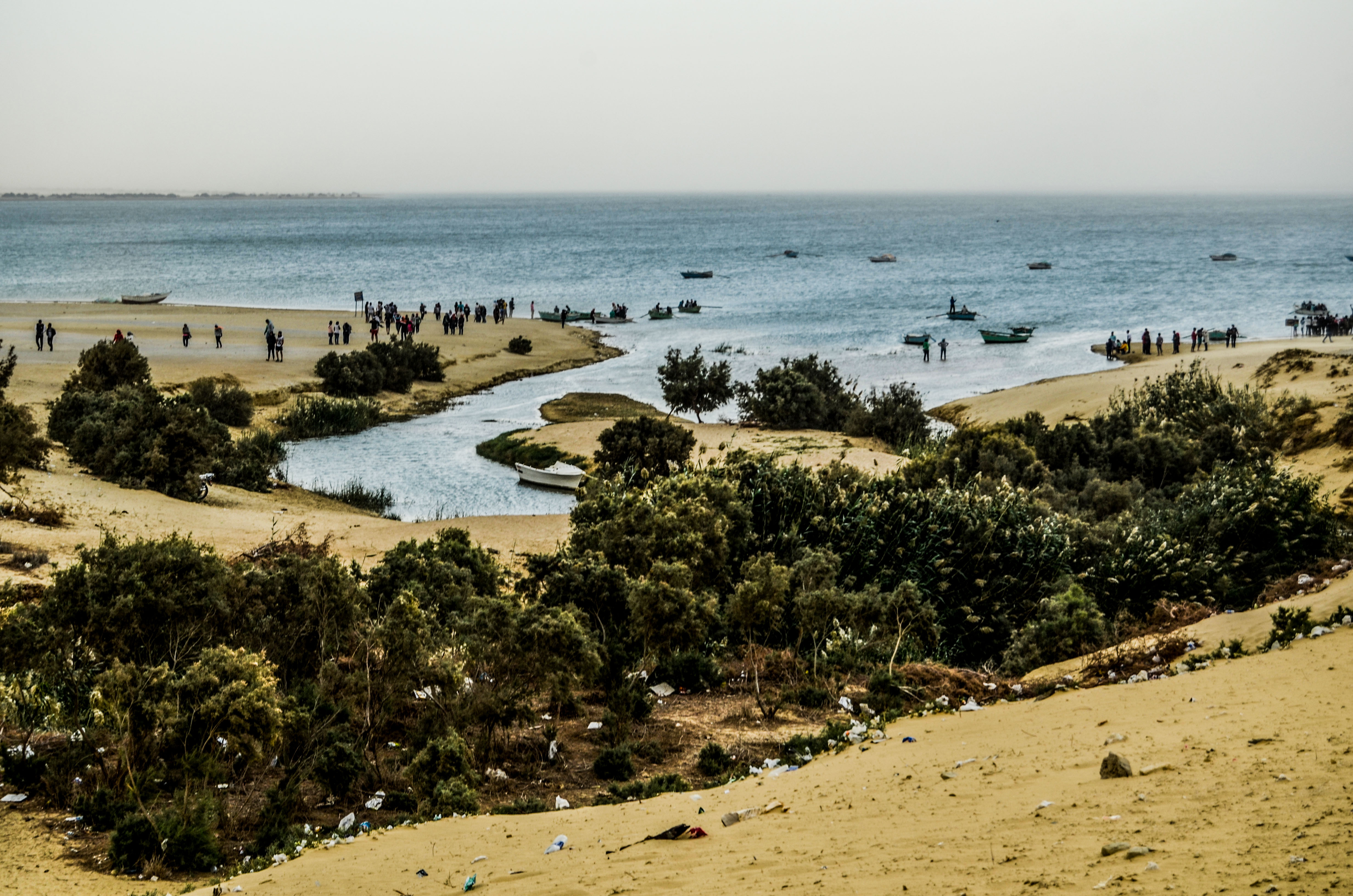 هضبة تطل على بحيرة قارون